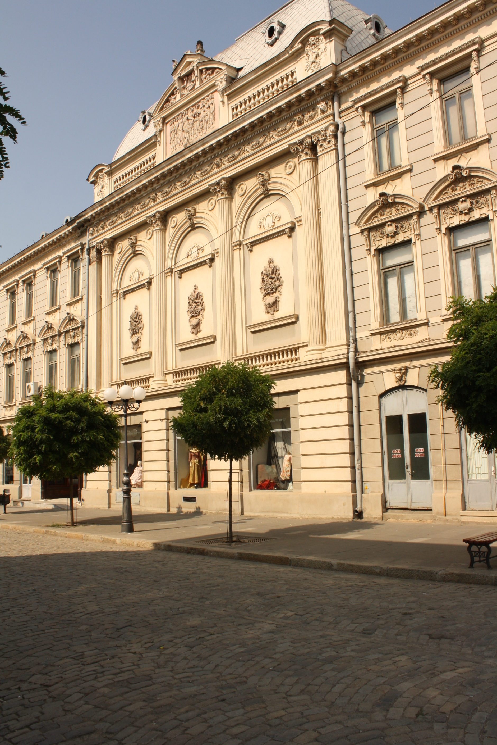 Teatrul " Rally"(1896), azi Teatrul "Maria Filotti", Str. Eminescu Mihai 2, Braila